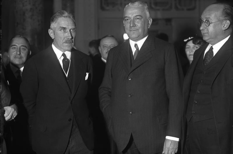 Reichskanzler von Papen spricht vor der Aussländischen Presse in Berlin! Reichskanzler von Papen und Reichsaussenminister von Neurath im Hotel Adlon in Berlin vor der bedeutsamen Rede des Reichskanzlers im Gespräch mit Journalisten.